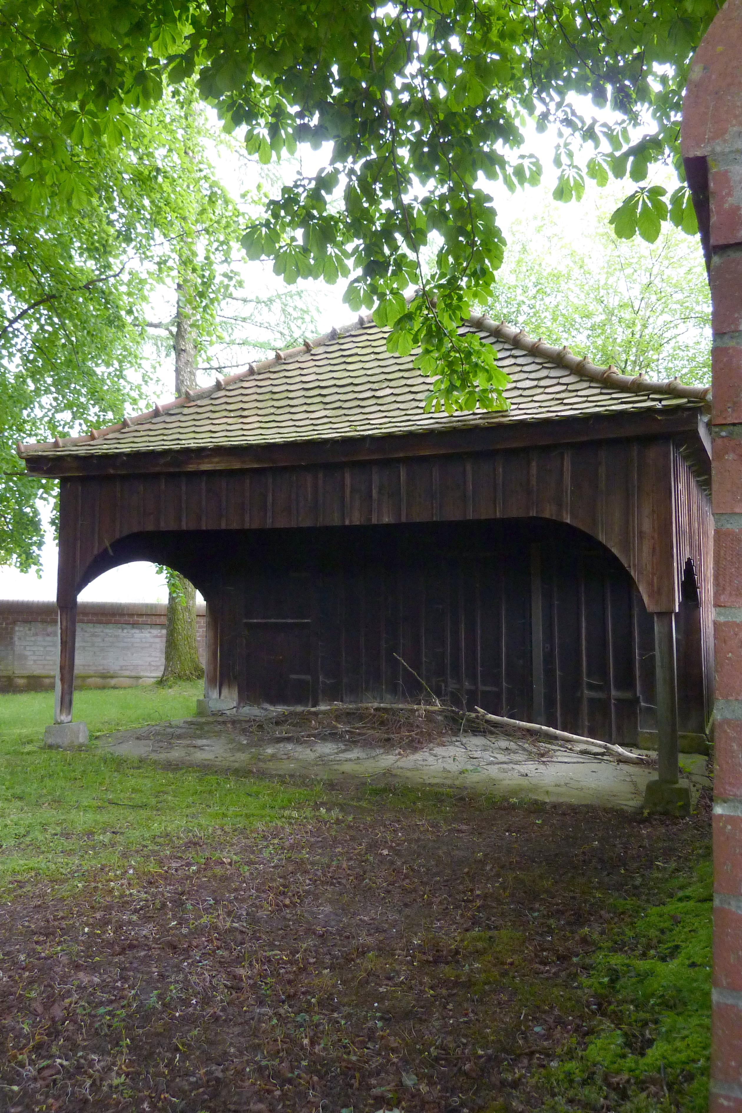 Jüdischer Friedhof in Fischach im Landkreis Augsburg (Bayern)